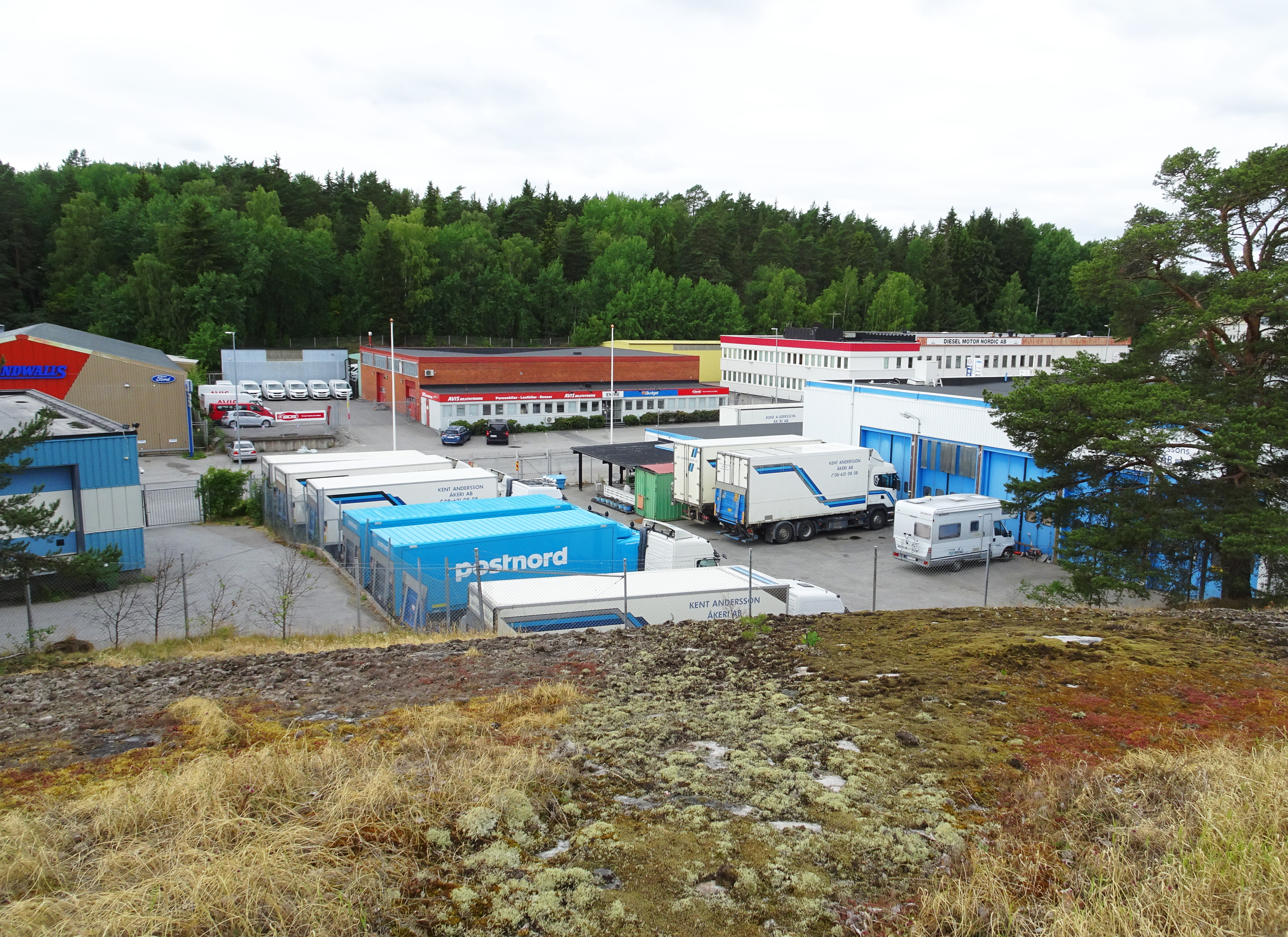 Veddesta industriområde